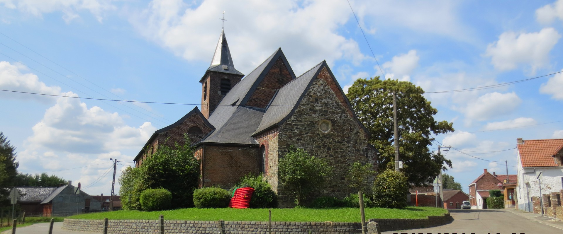 Papignies